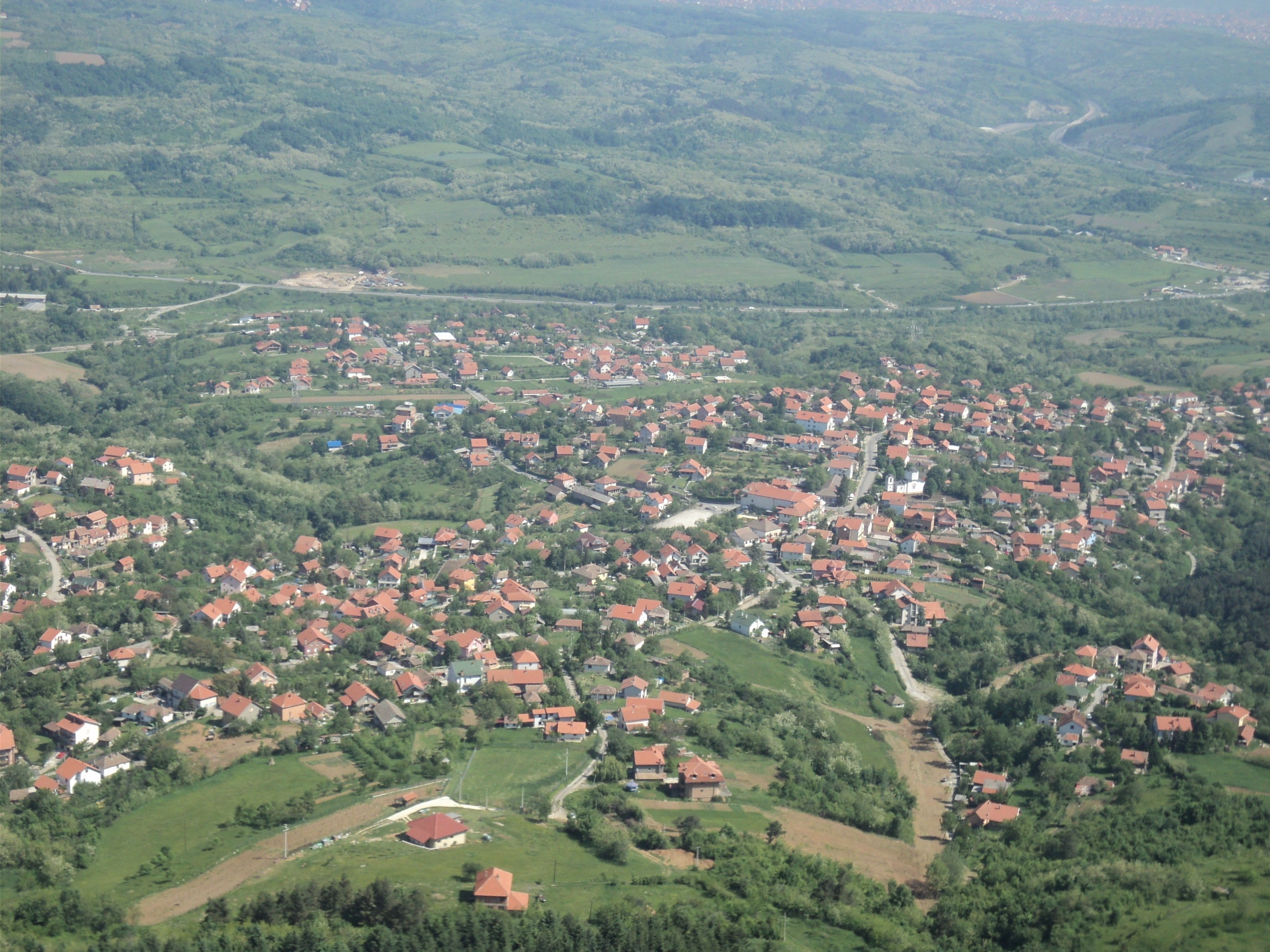 Pogled na naselje Beli Potok sa Avalskog tornja. Self-made. Maj 2011.